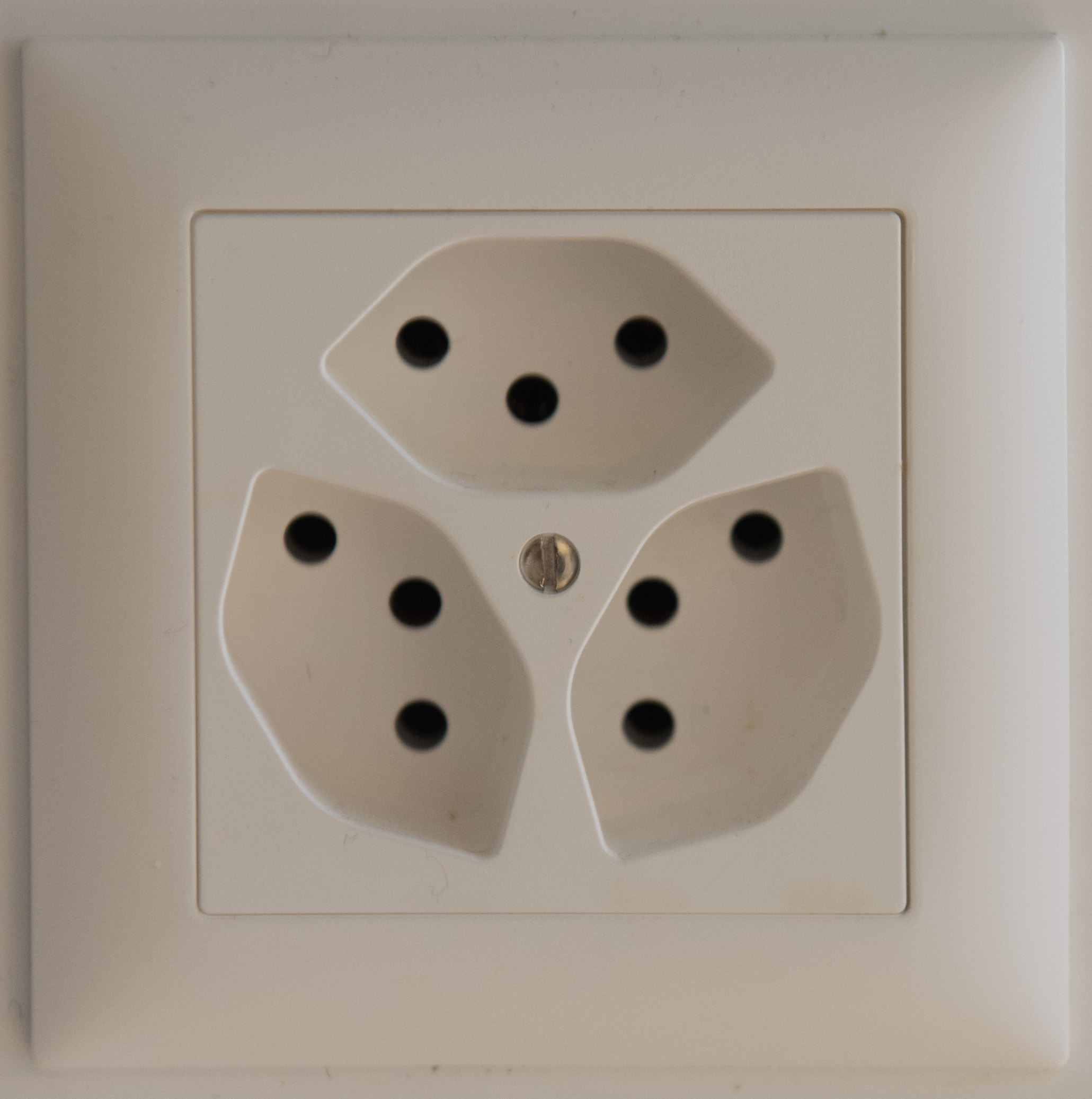 Dreifach-Steckdose nach der Norm SEV 1011, T13; Unterputz